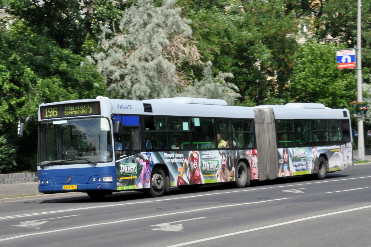 196-os busz (Budapest)